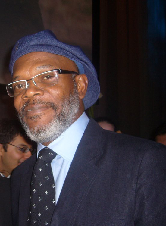 Samuel L. Jackson at a Los Angeles event.